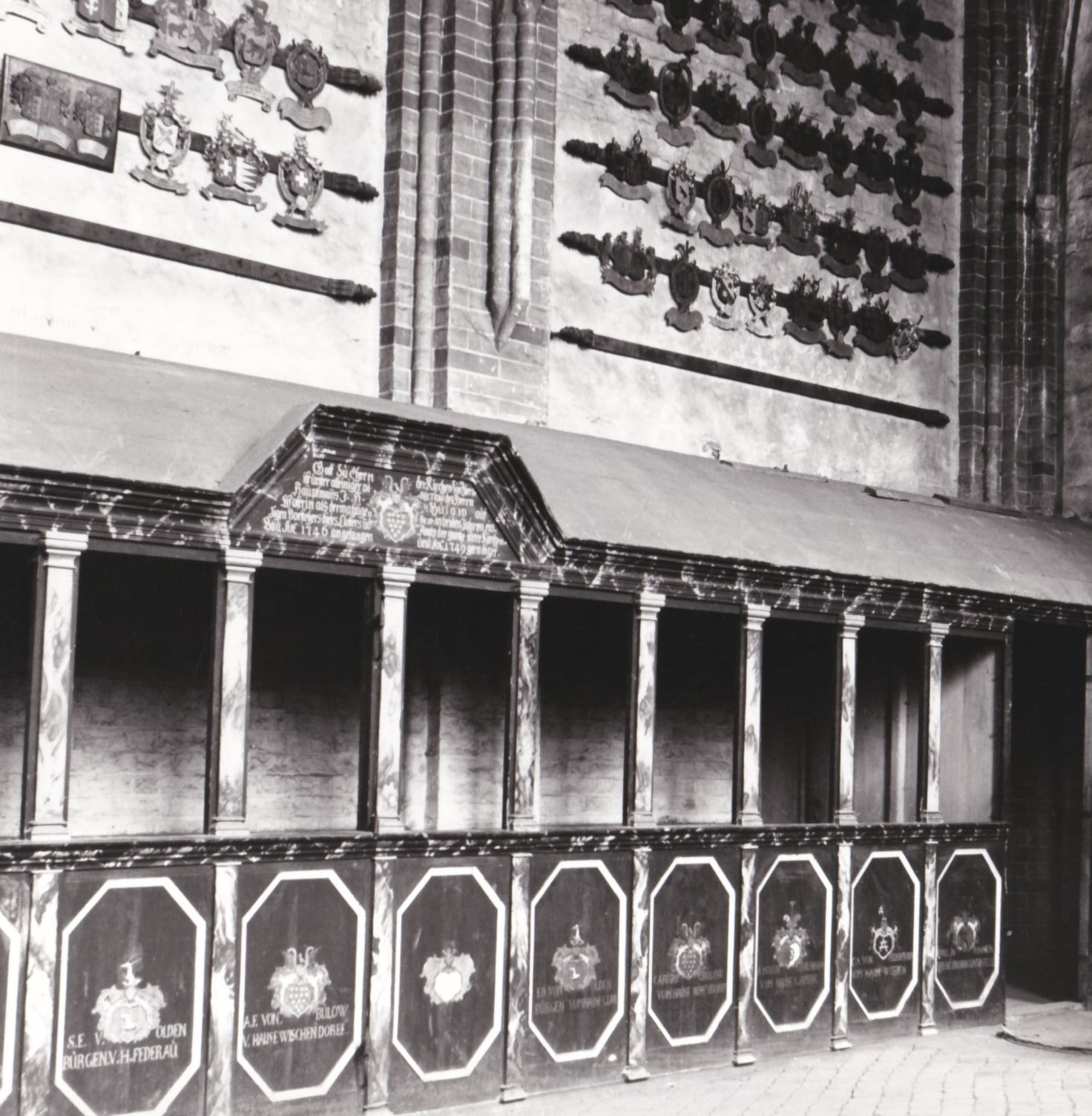 Südliche Gebetsloge auf der Nonnenempore der Klosterkirche Dobbertin, darüber die Familienwappen der Konventualinnen